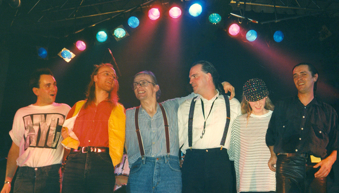 Foto der Band "Gundermann & Seilschaft". Aufgenommen im Kesselhaus der Kulturbrauerei Berlin